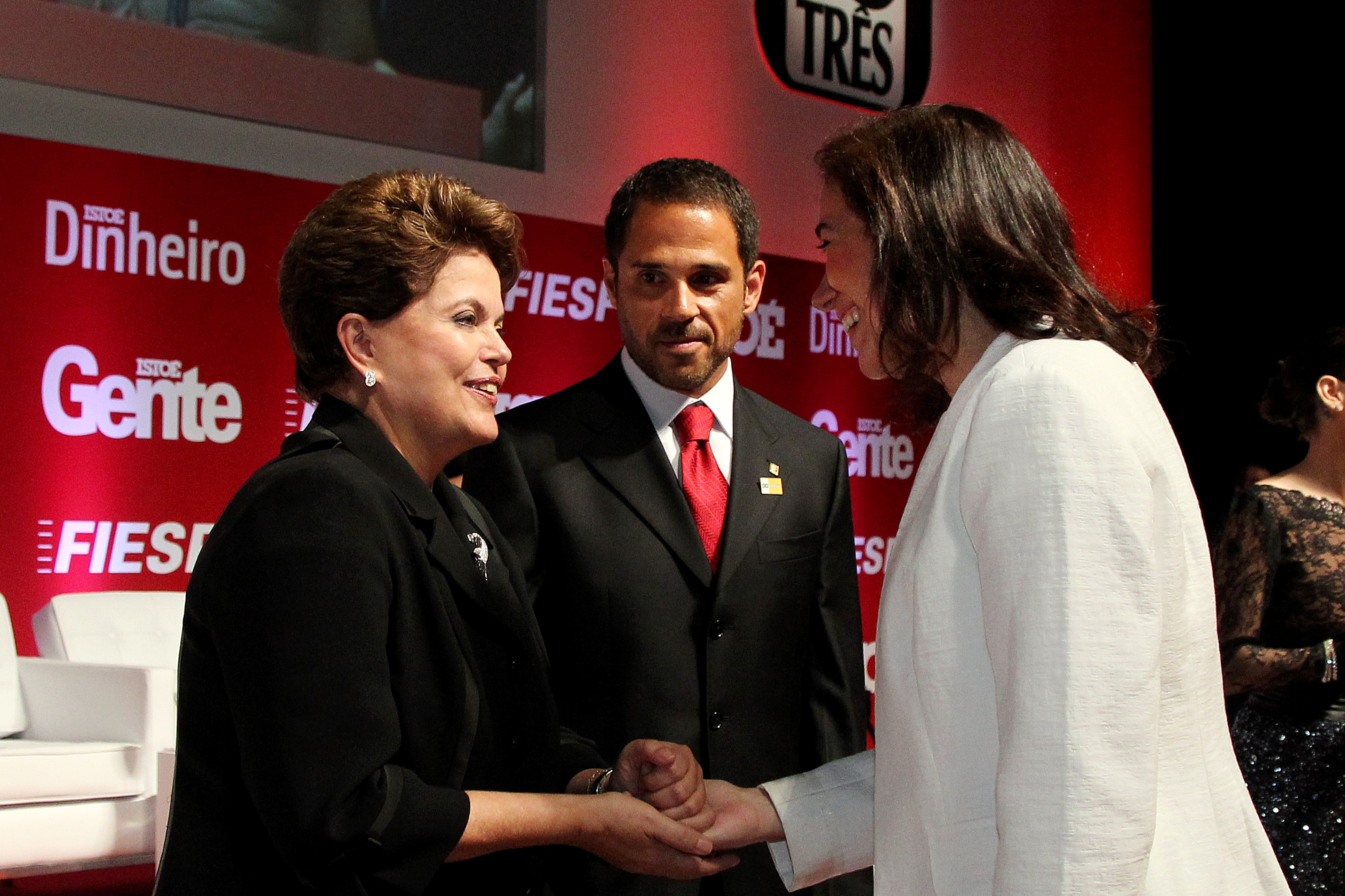 Presidente Dilma Rousseff e a atriz Lilia Cabral, durante cerimônia de entrega do Prêmio " Os Brasileiros do Ano", promovido pelas revistas Istoé, istoé Dinheiro e Istoé Gente. (São Paulo-SP, 06/12/2011)